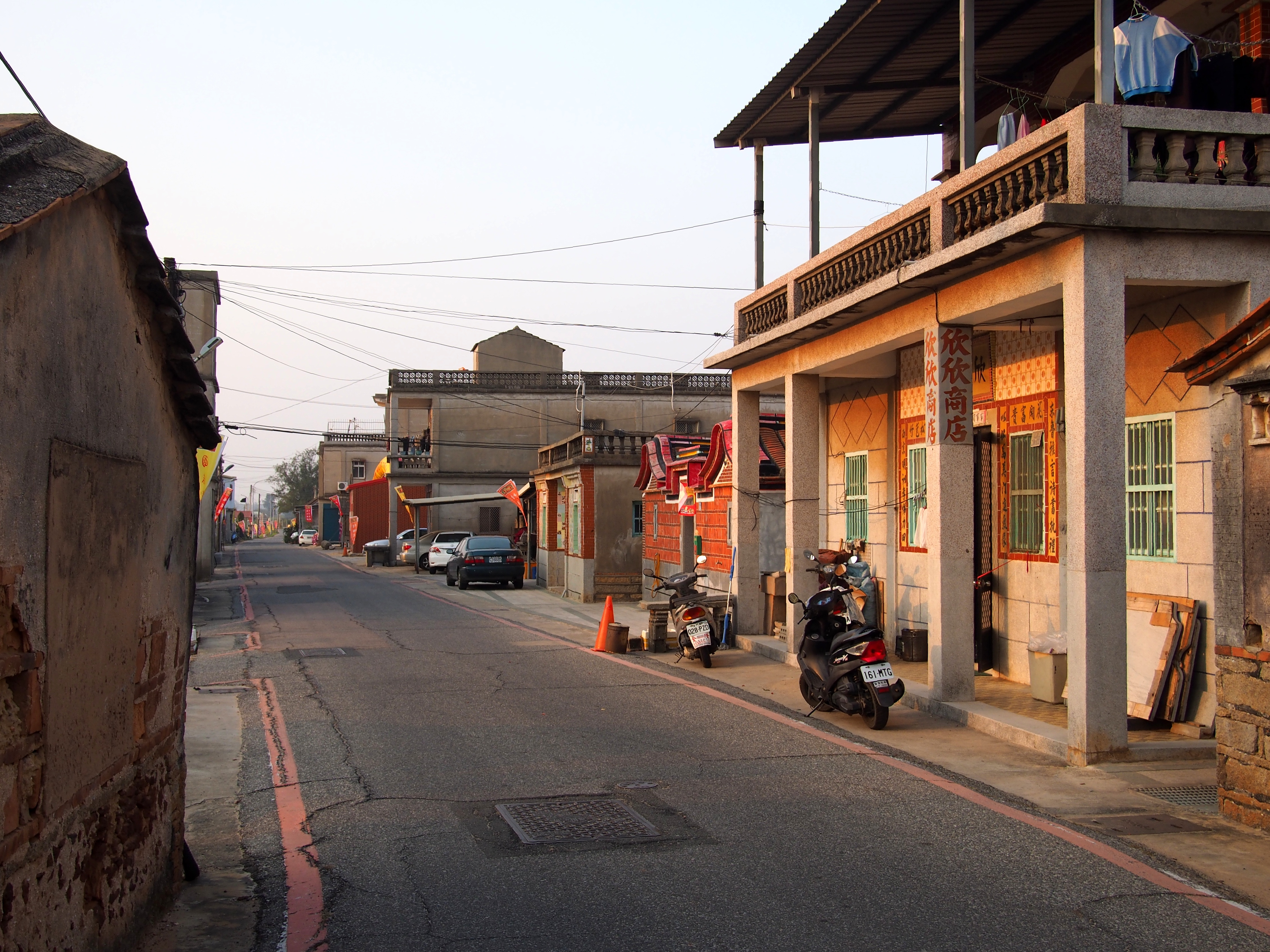 西堡村 - Xibao Village - 2015.01